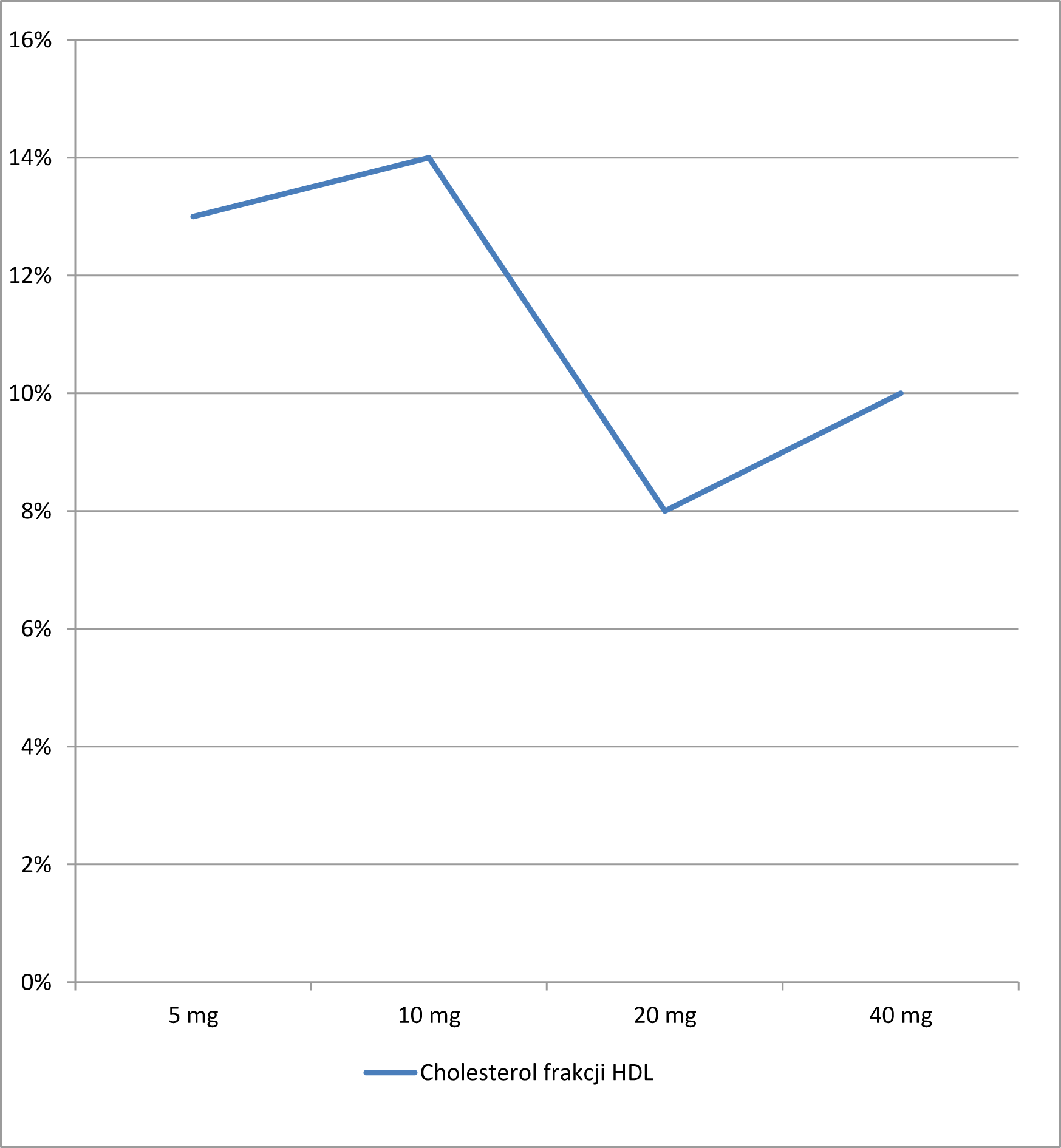 Wpływ rosuwastatyny na wskaźniki lipidowe (dane do wykresu za CRESTOR (rosuvastatin calcium) tablets)